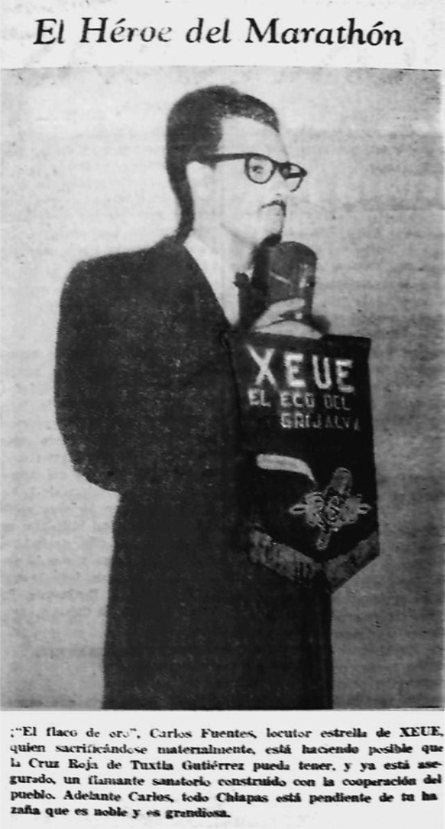 Imagen con pié de foto del maratón radiofónico por XEUE, para la instauración de la Cruz Roja en Tuxtla Gtz. Chis.